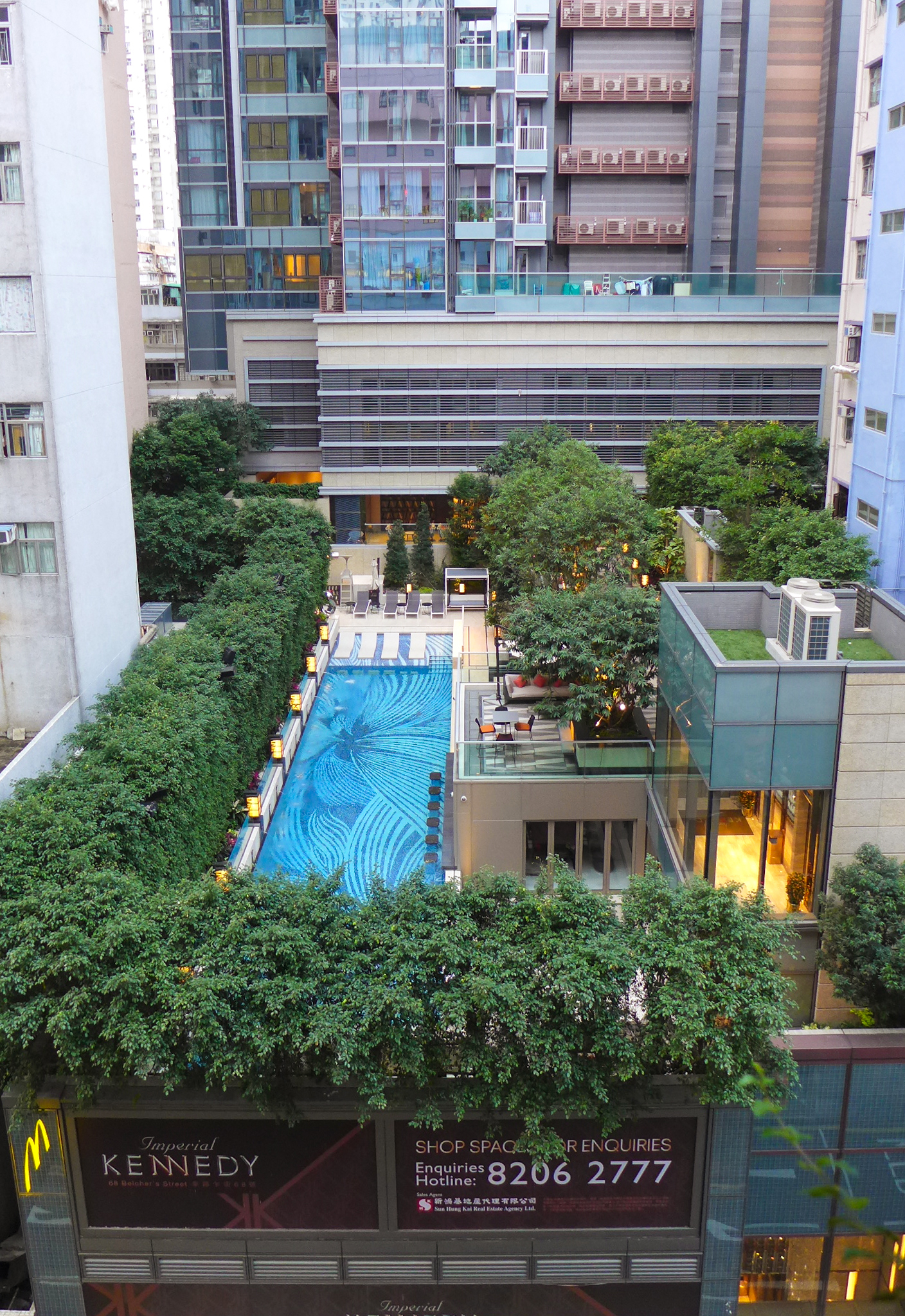 Imperial Kennedy Podium view